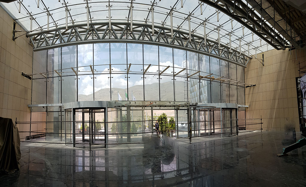 Iranmall